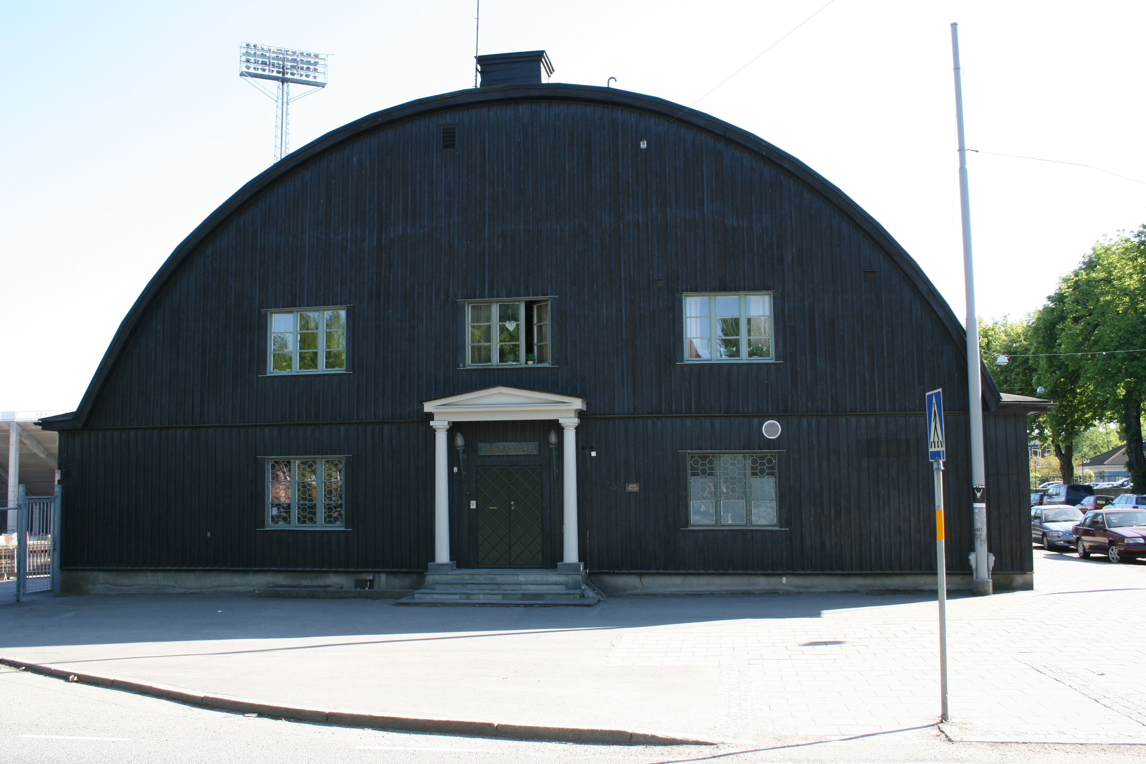 Tennishallen vid Södra promenaden i Norrköping